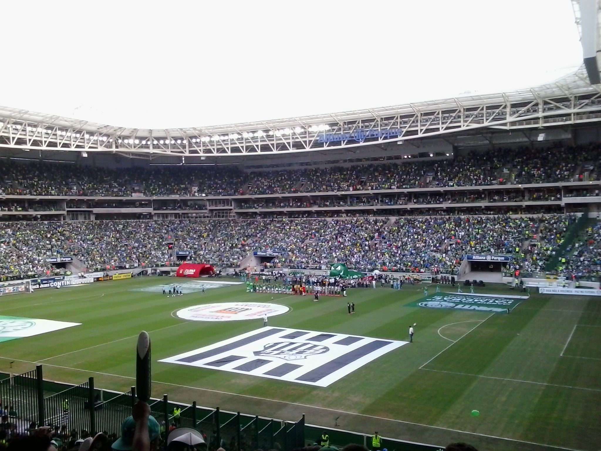 Português do Brasil: Primeira Final do Campeonato Paulista de 2015 entre Palmeiras e Santos no Allianz Parque